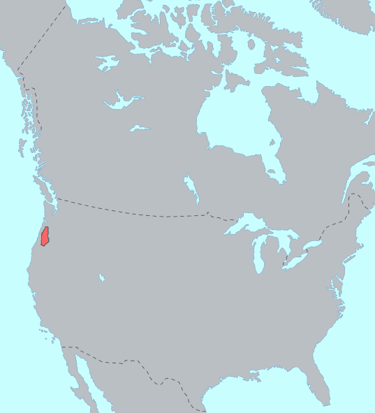 distribution of Kalapuyan languages